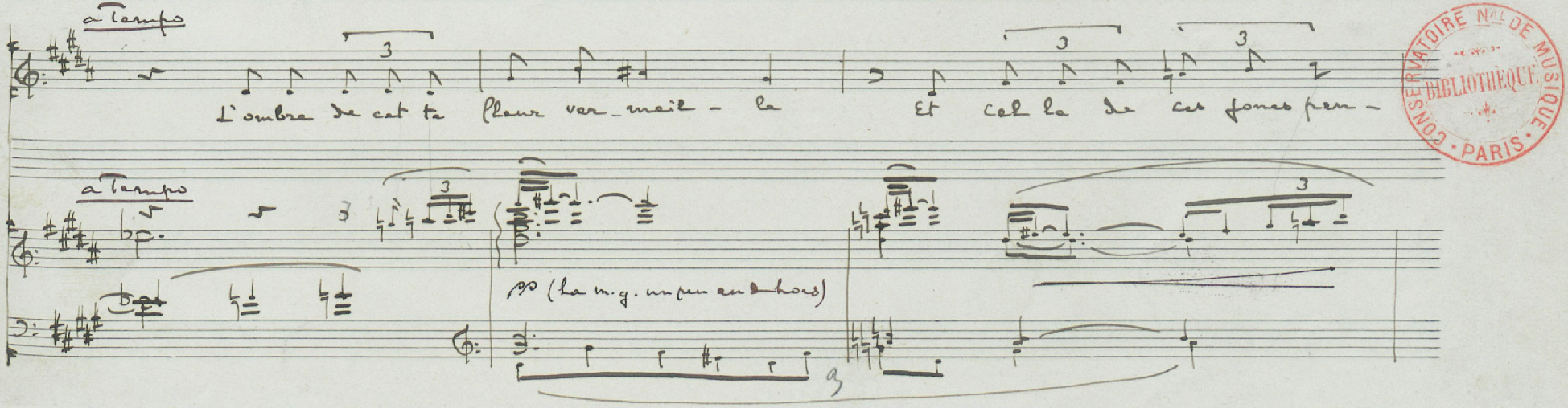 Claude Debussy (1862-1918) - extrait des "Trois Chansons de France" (manuscrit autographe), n°II "La Grotte" (Tristan L'hermite)